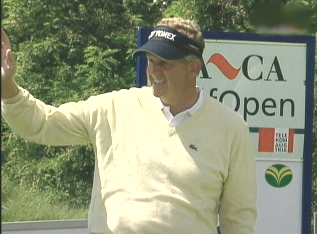 Bildbeschreibung: Colin Montgomerie bei den Austrian Open 2006 Quelle: eigene Aufnahme mit einer Handycam Fotograf/Zeichner: Boss 15:50, 11 June 2006 (UTC) Datum: 8.6.2006 Sonstiges: GNU